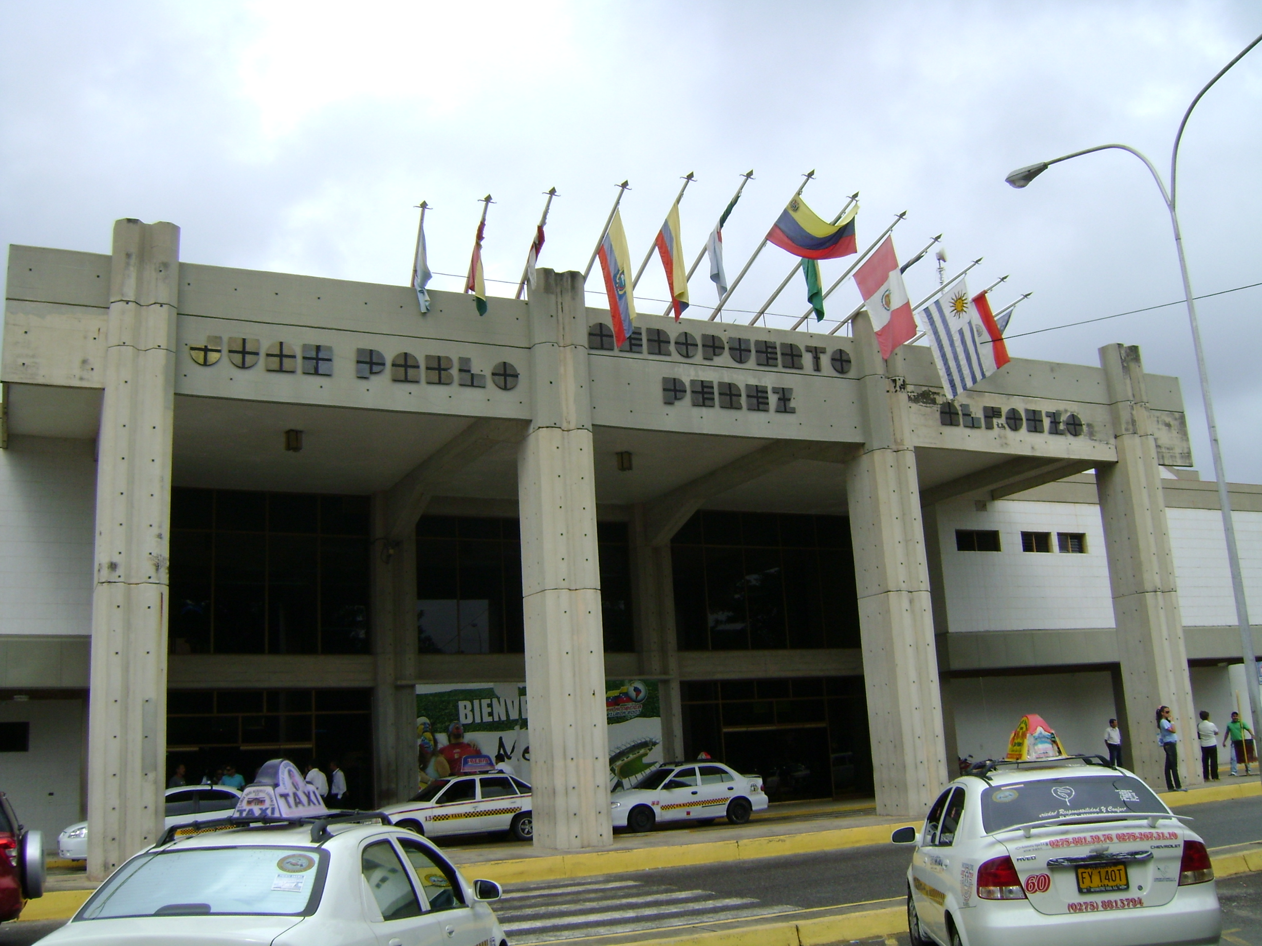 foto tomada de la entrada del Aeropuerto Juan Pablo Pérez Alfonzo